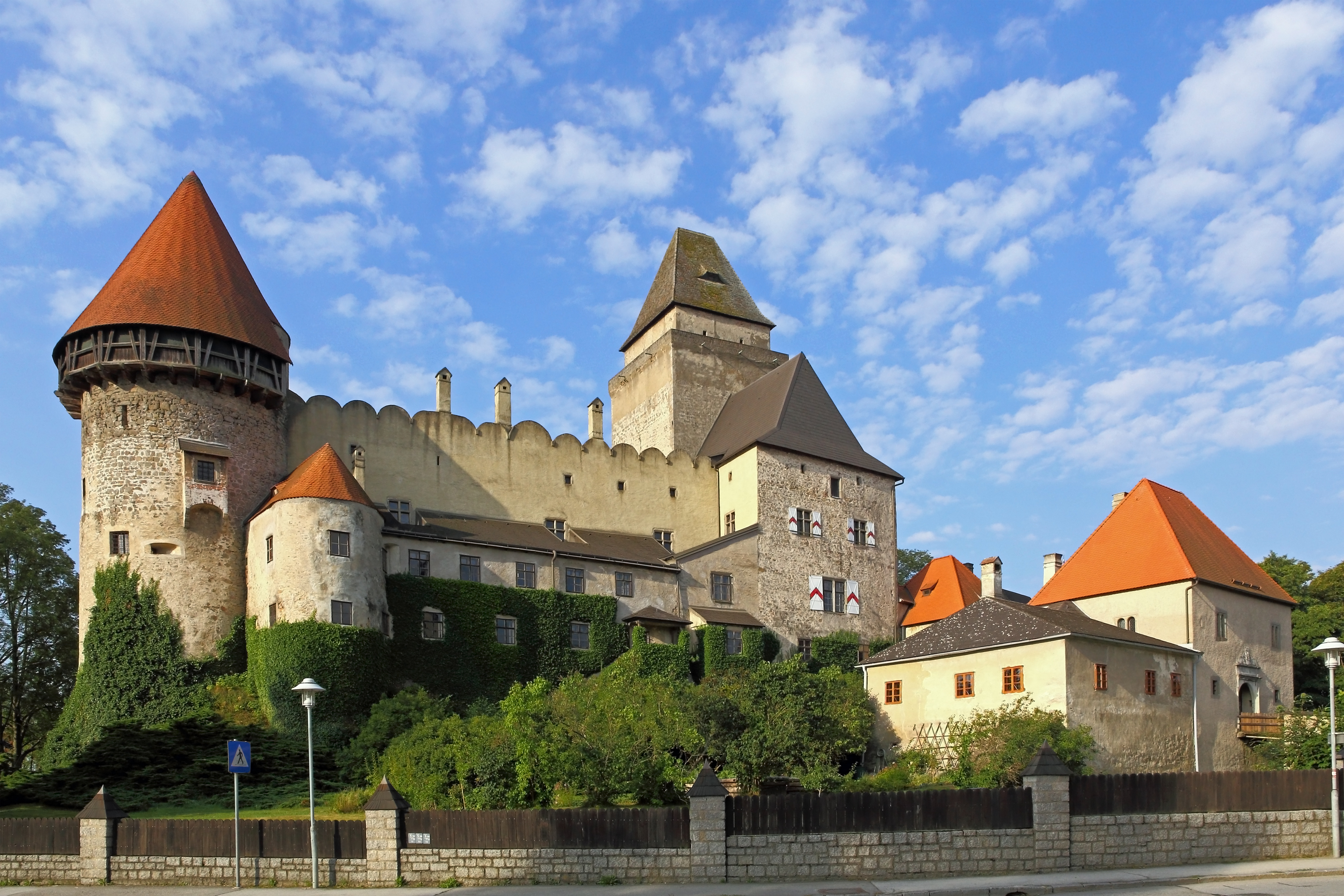 Burg Heidenreichstein ist die größte erhaltene mittelalterliche Wasserburg in Niederösterreich.